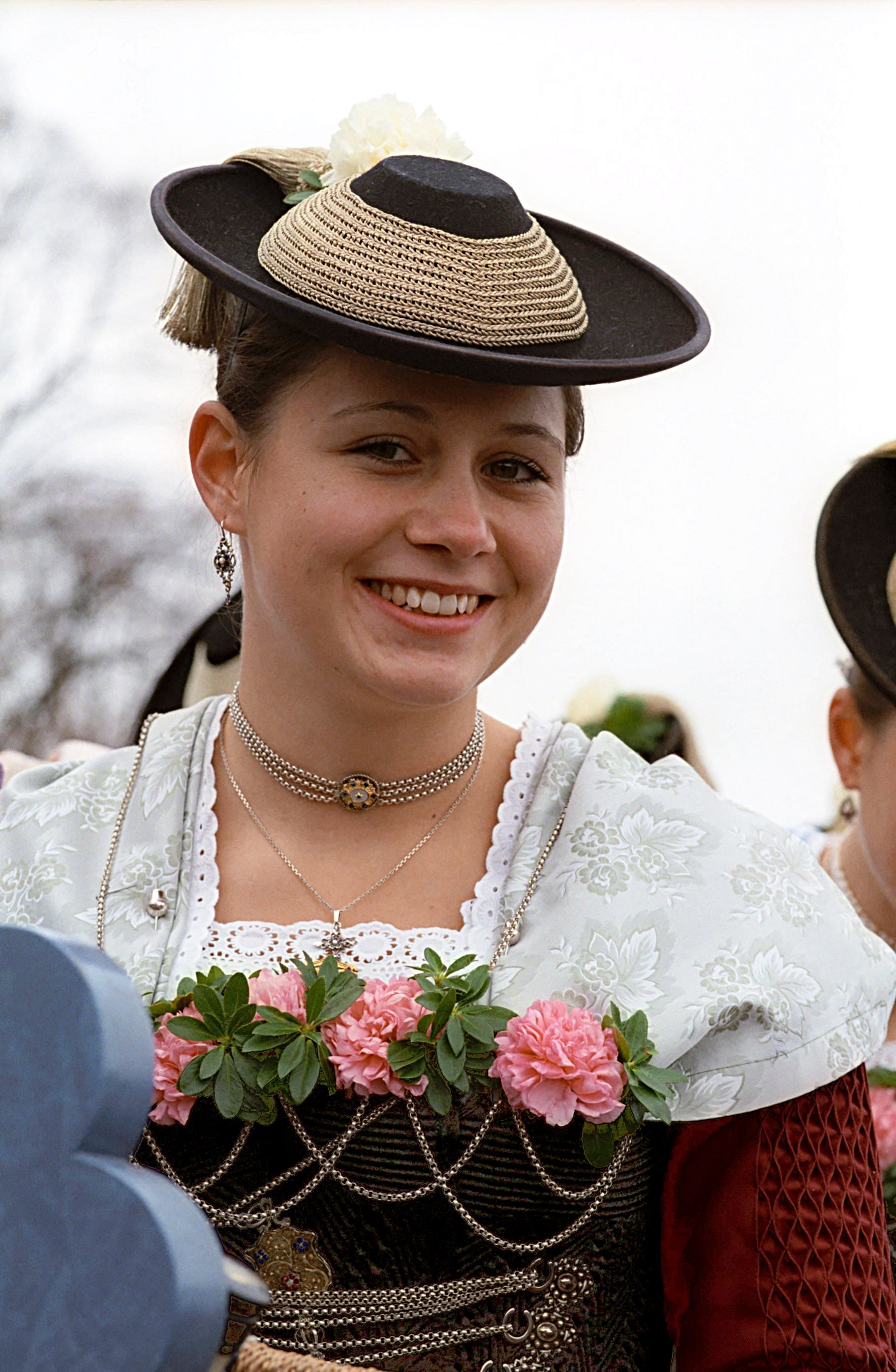 Oberbayrische Tracht bei der Tölzer Leonhardifahrt